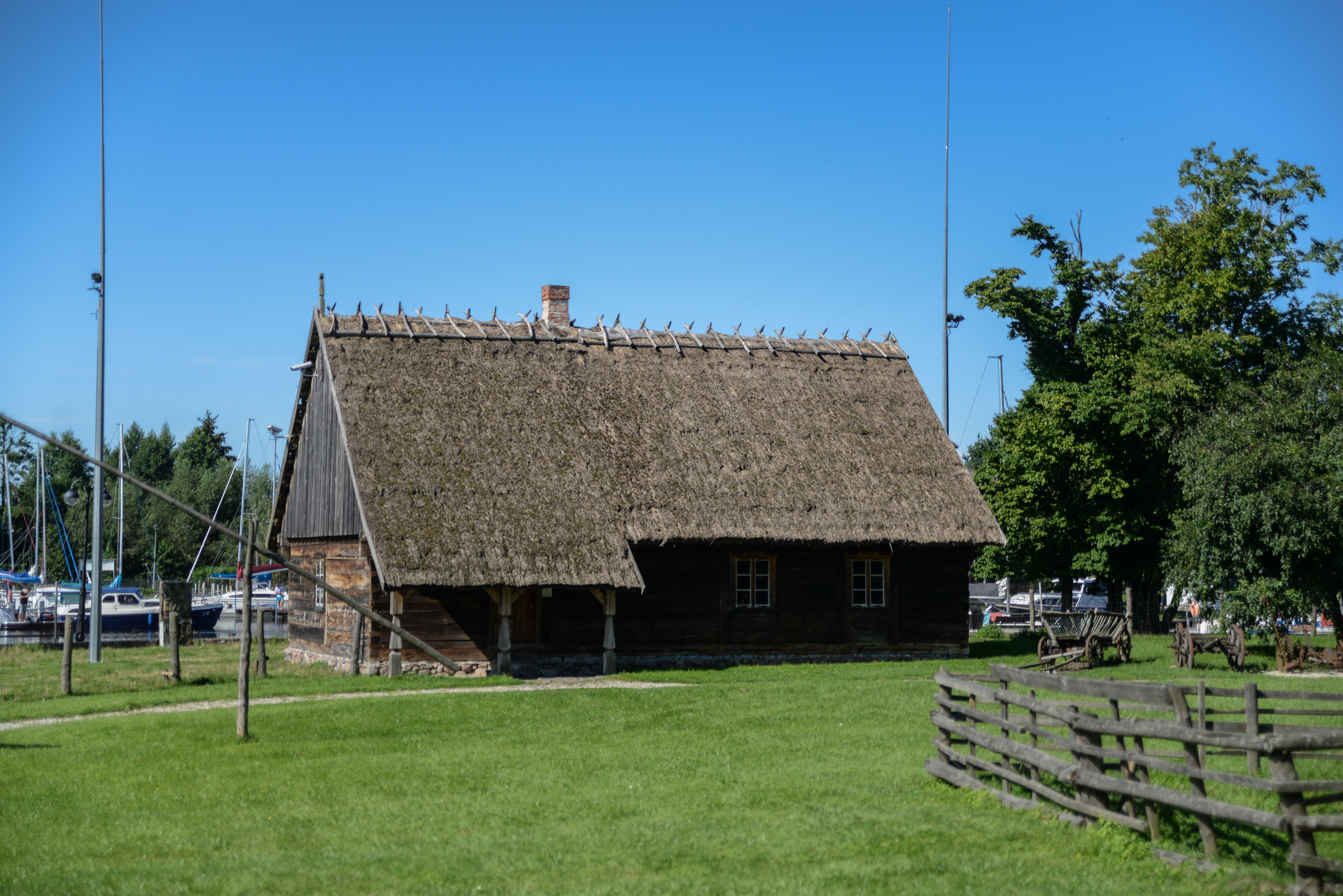 Węgorzewo, Park etnograficzny (teren) Wikidata has entry Q32054132 with data related to this item.